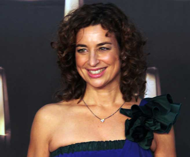 Isabel Varell beim Deutschen Fernsehpreis 2012